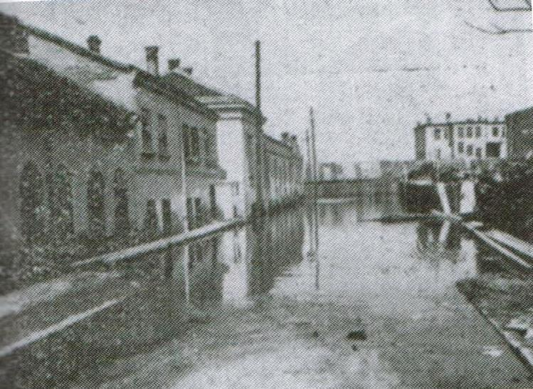 השכונה היהודית יאלייה מוצפת במי הדנובה